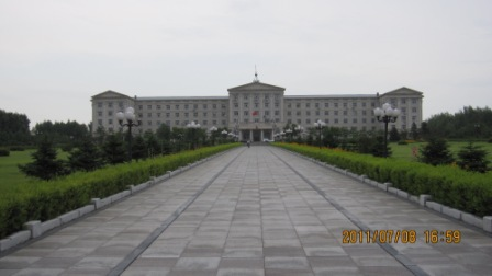 Rathaus der Stadt Wuchang in der Provinz Heilongjang, Metropolregion Harbin